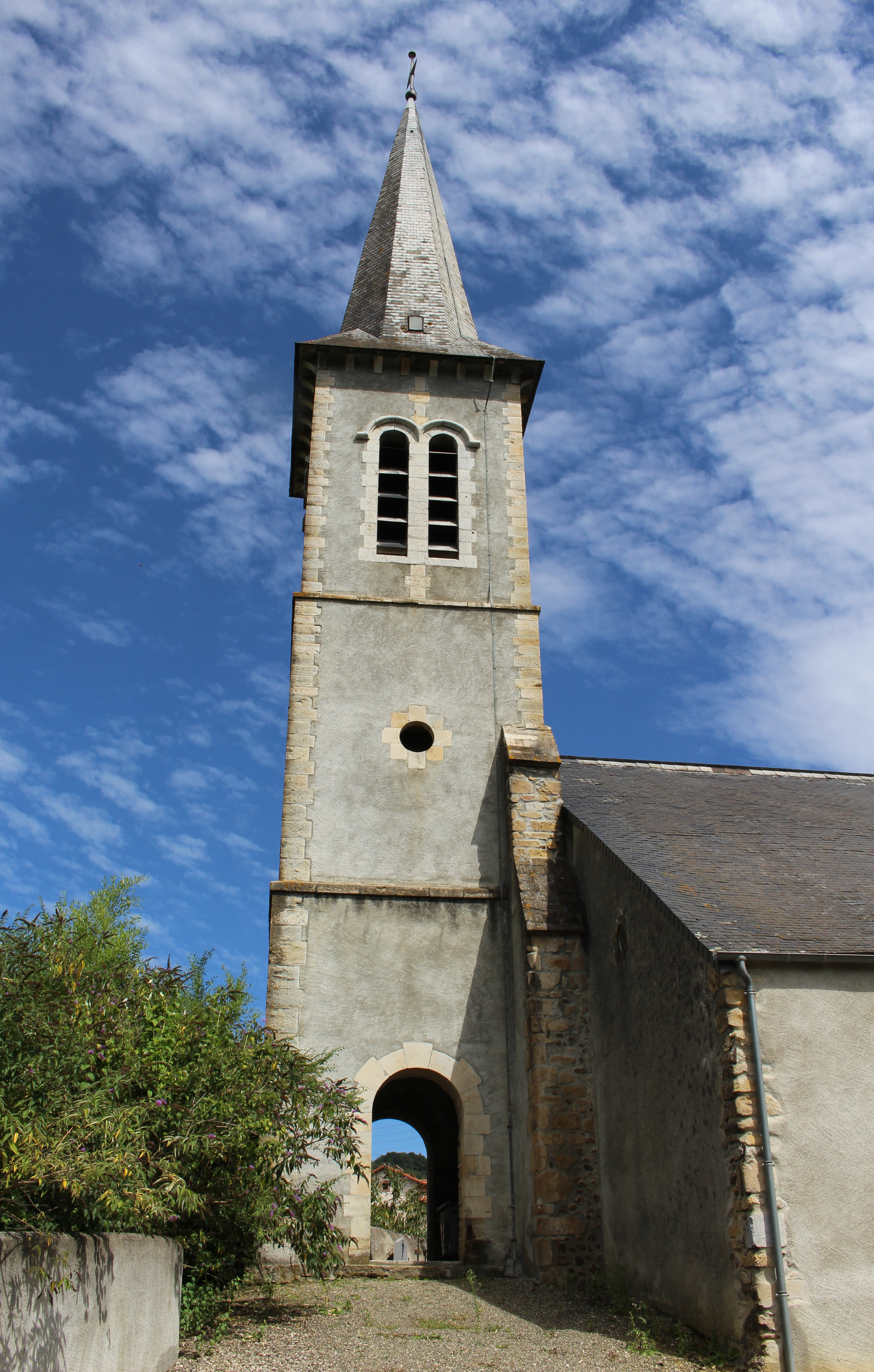 Église Saint-Pierre de Lanespède (Hautes-Pyrénées)